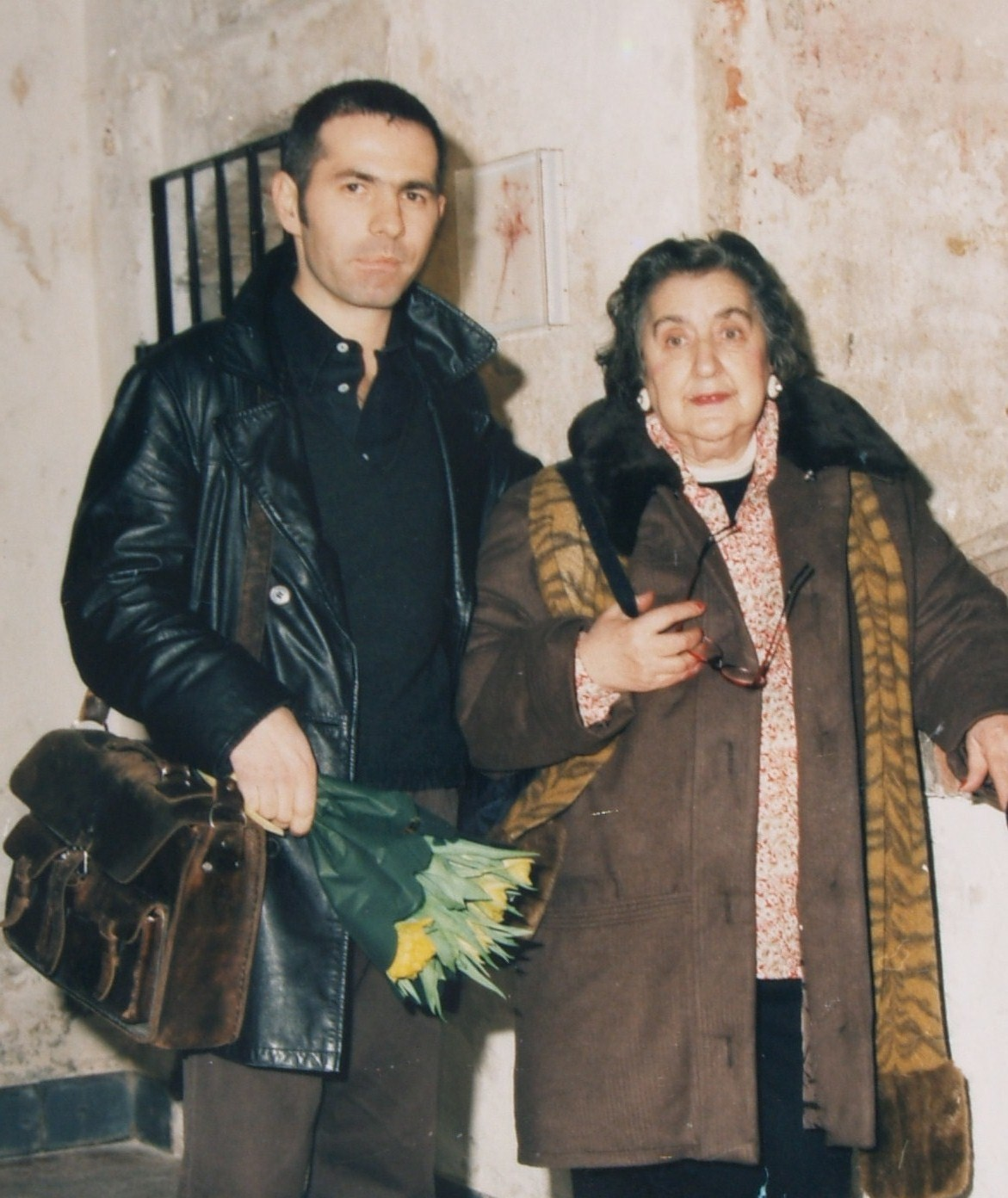 lavoro proprio